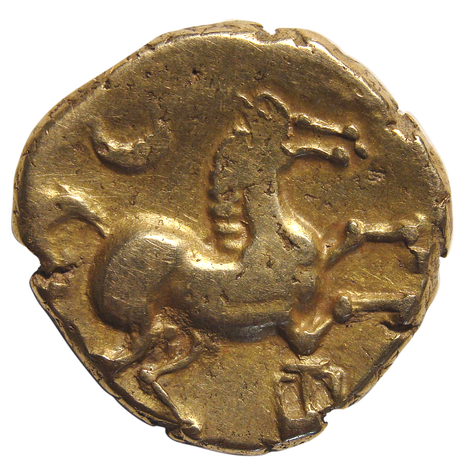 Statère arverne en or au nom de Vercingétorix, REVERS. Monnaie grecque en or ou en argent. Sert de modèle aux premières monnaies gauloises. Proviendrait du trésot de Pionsat, découvert en 1852 dans le Puy de Dôme.